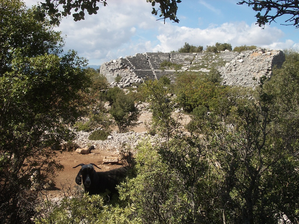 Theater in Kyaneai, Lykien, Türkei